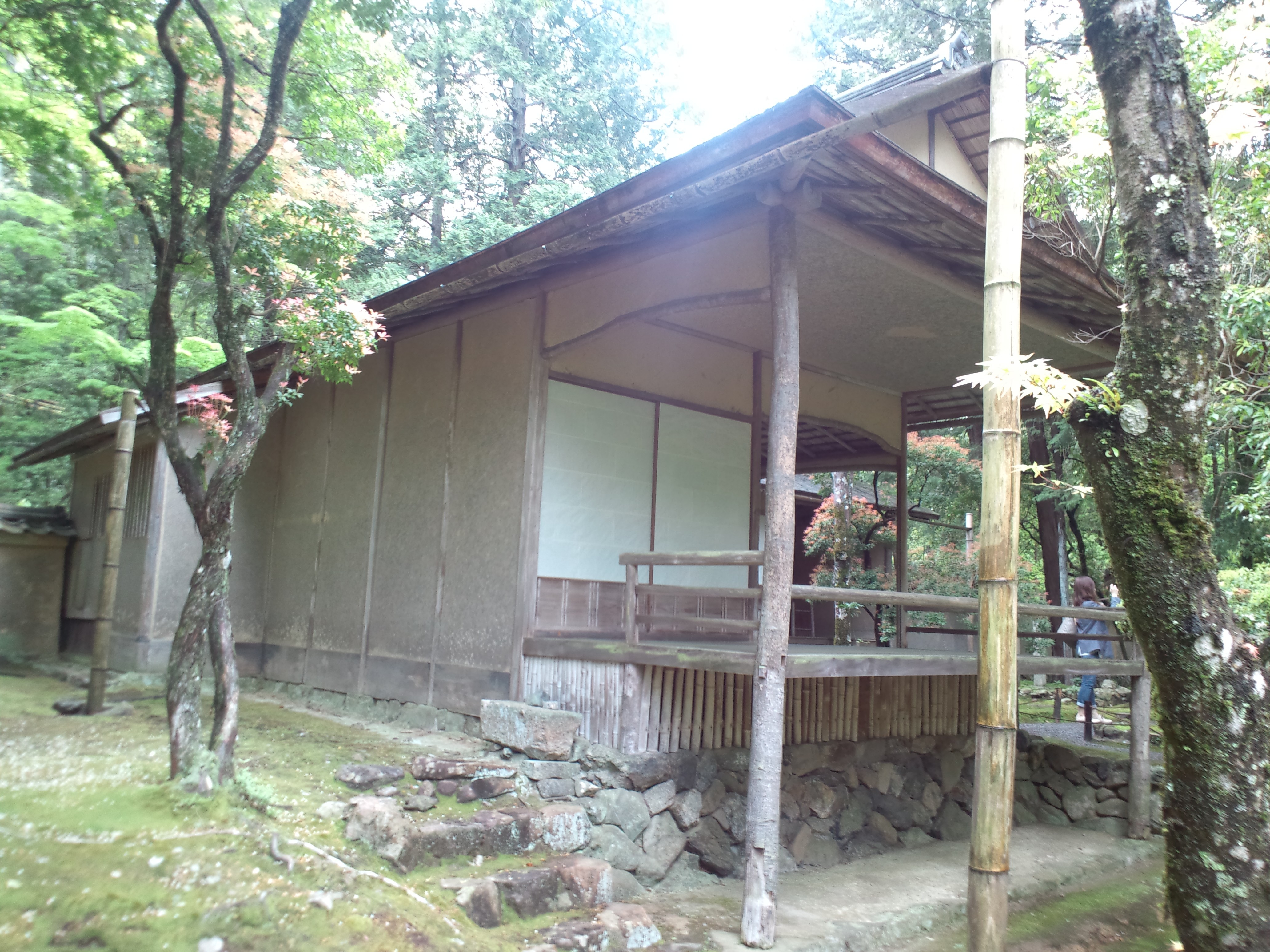 西芳寺 湘南亭茶室